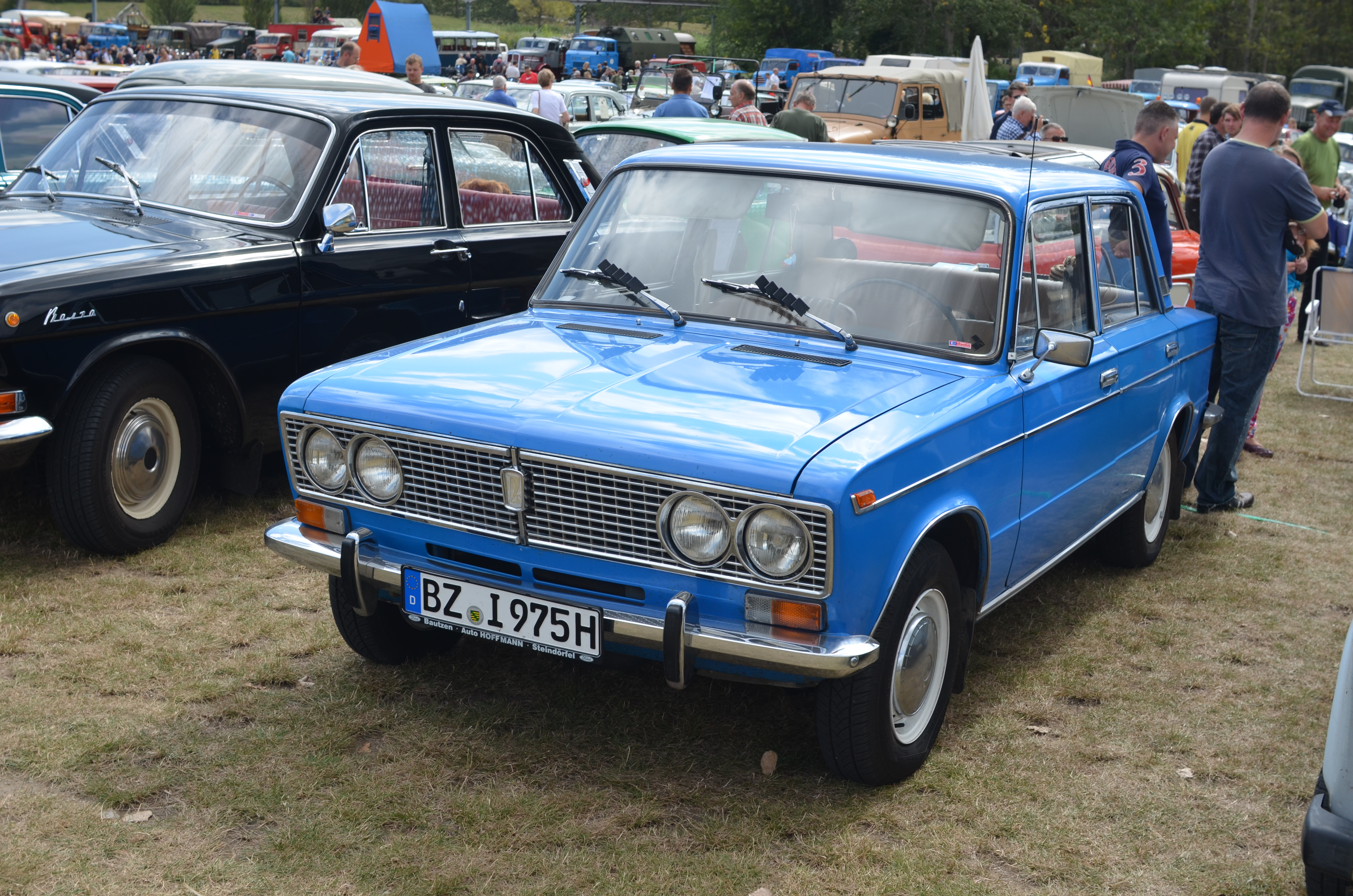 Lada 1500